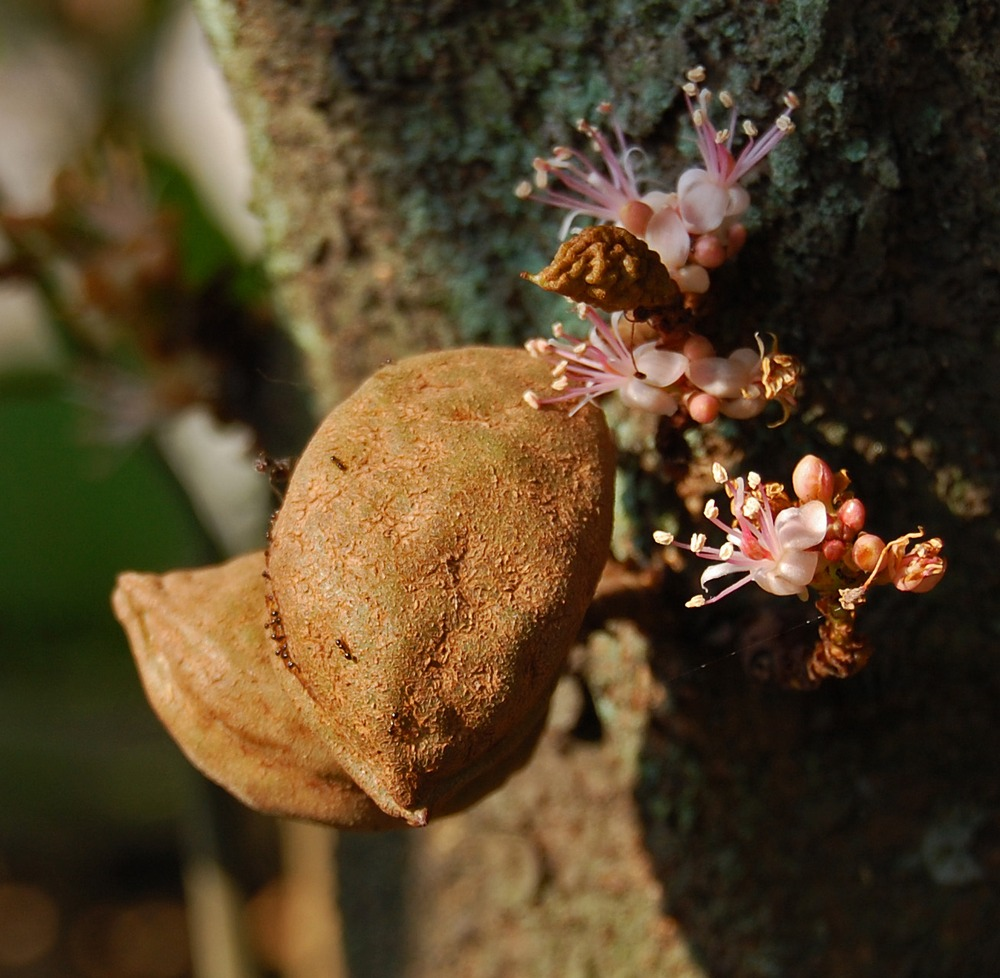 Cynometra cauliflora inflorescence. Bogor, West Java, Indonesia